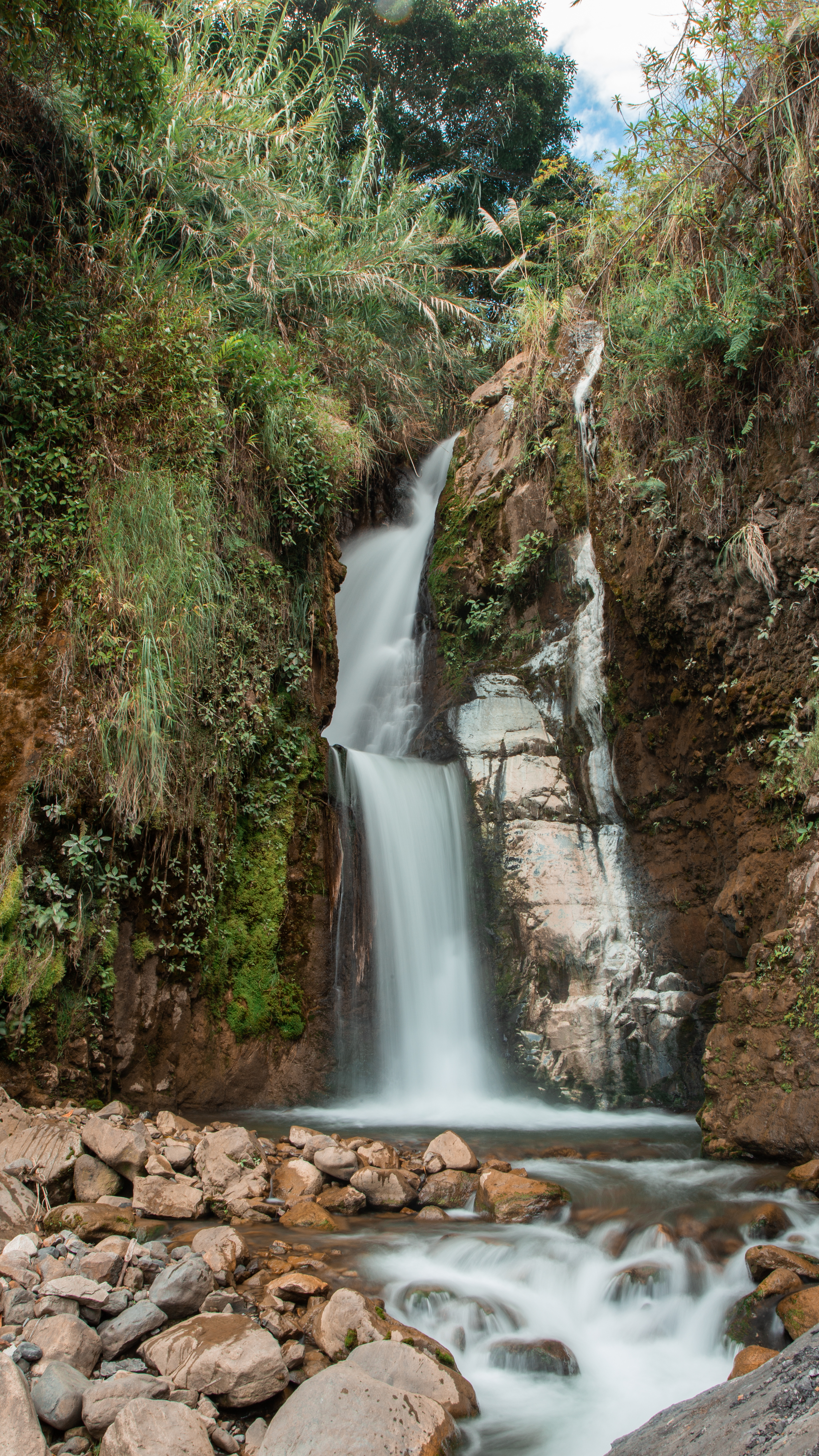 Cascada Chorrerón del Indio, Enciso